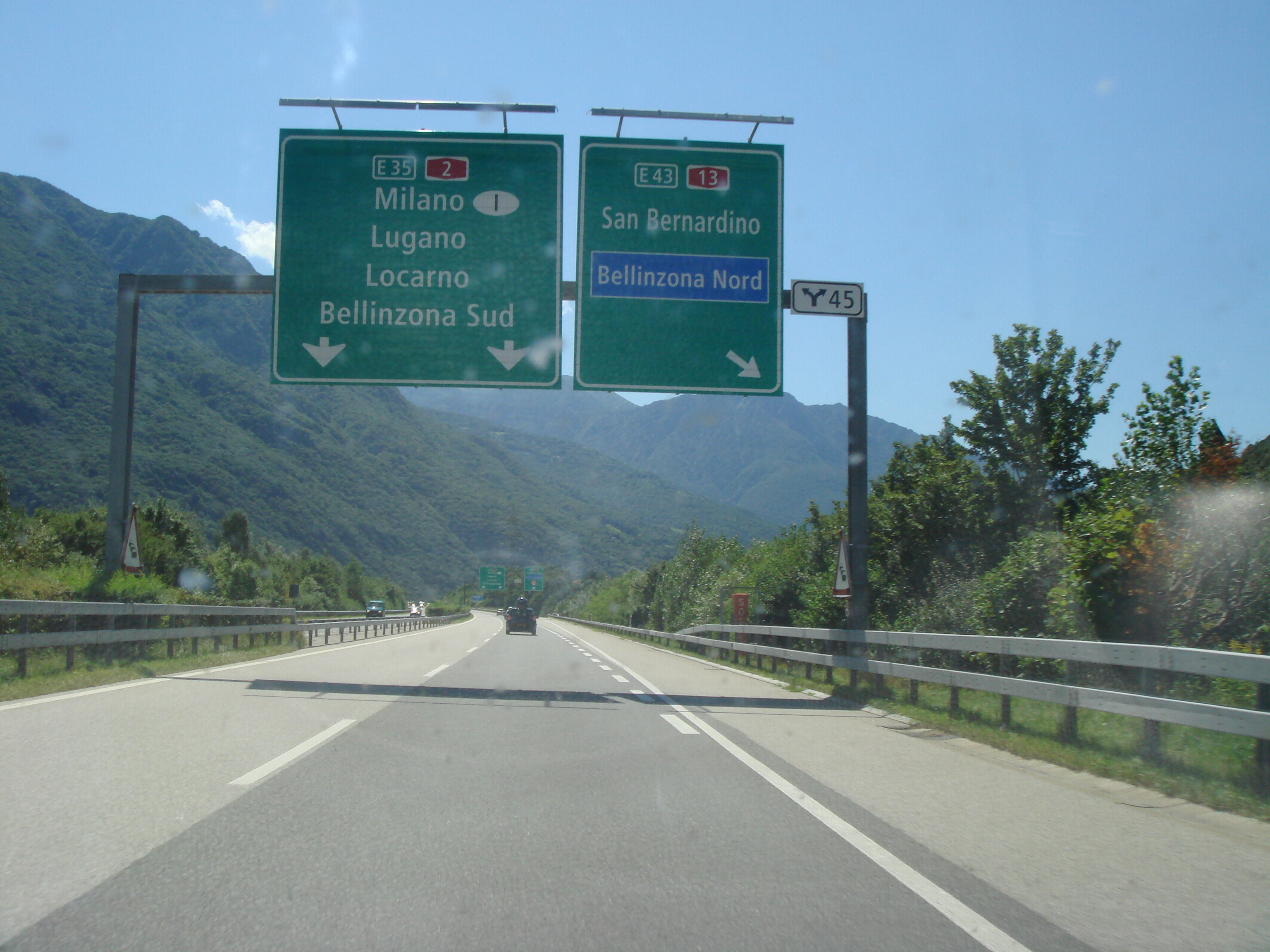 L'autoroute suisse A2 à la hauteur de Bellinzona